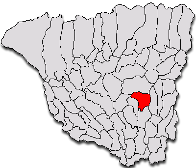 Categorie:Hărţi ale judeţului Gorj